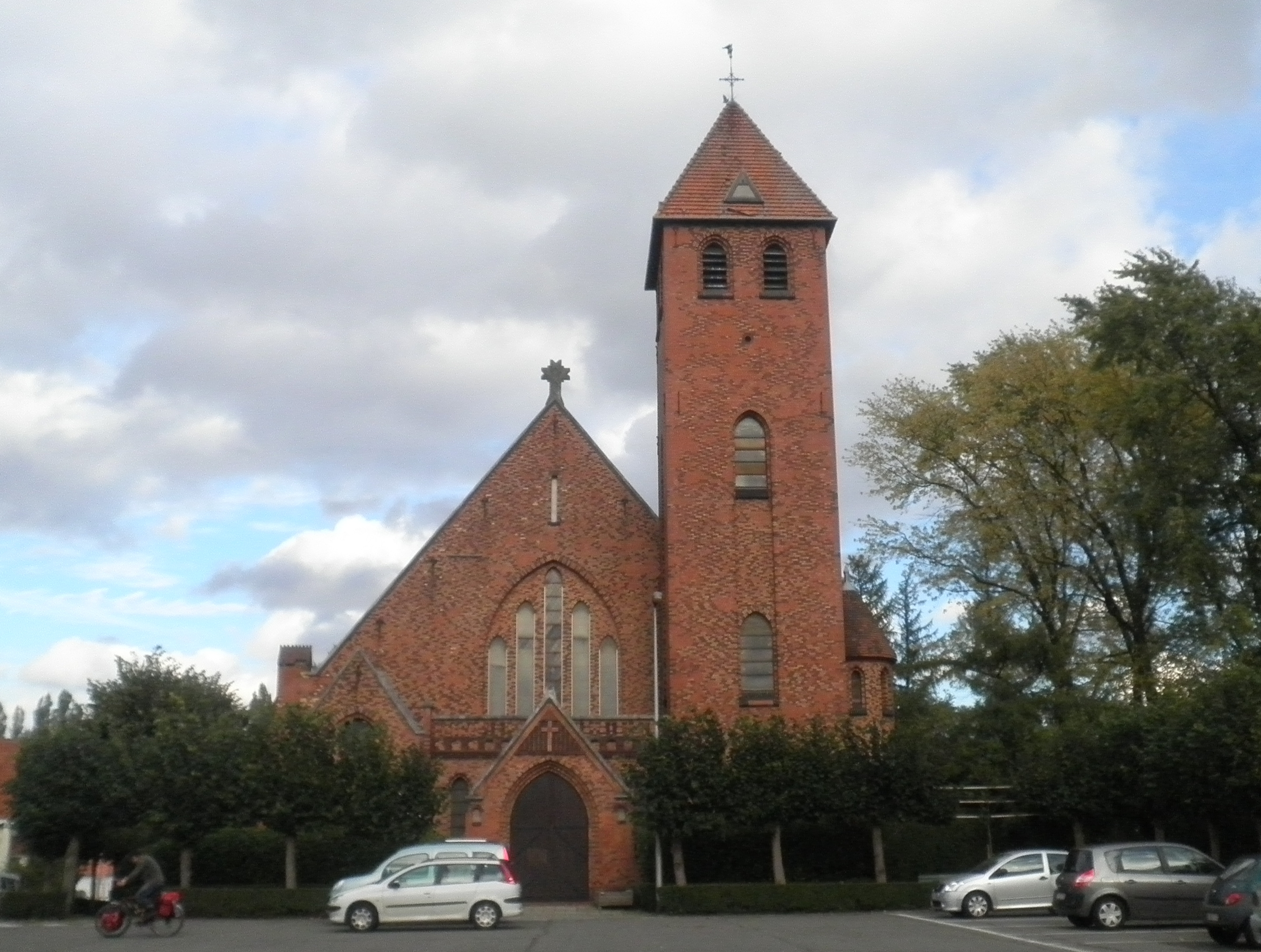 Uccle, église Saint-Joseph, parvis Chantecler.